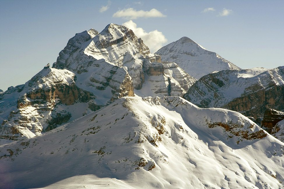 Skupina Le Tofane - 3244 m.n.m.